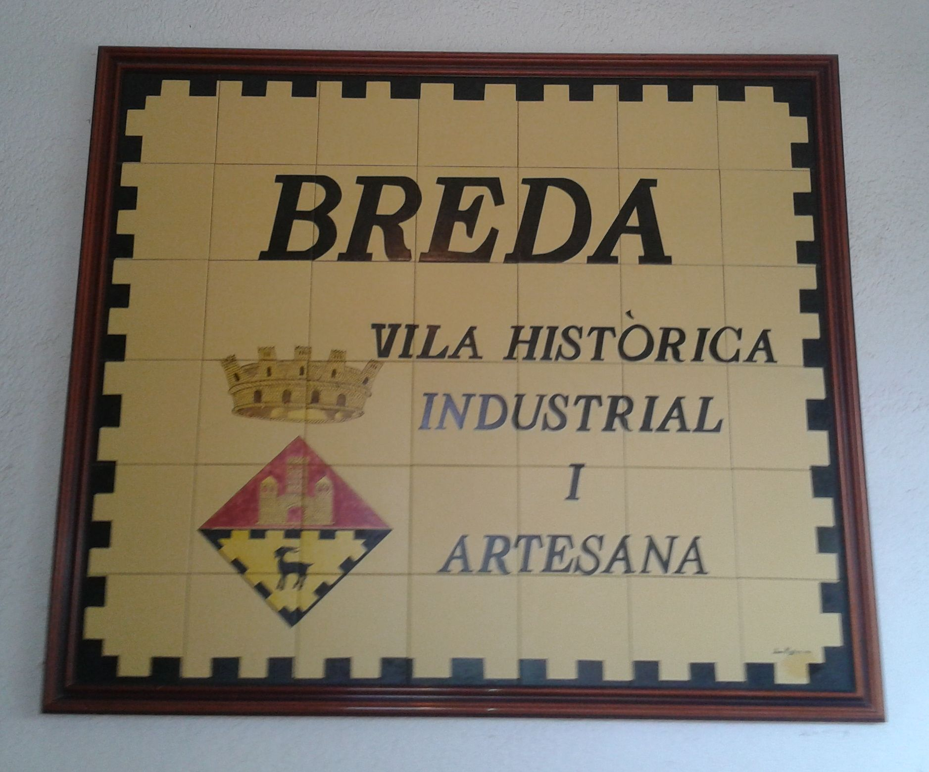 Rajoles: Ceràmica tradicional de benvinguda ala vila de Breda, amb el seu escut.